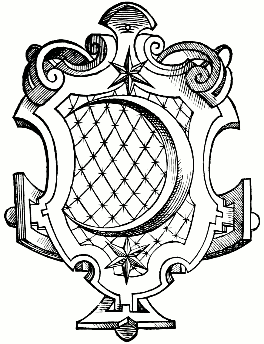 Wappen von Halle (Saale) 16. Jh.